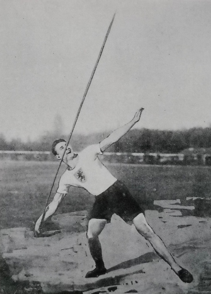 Mudin Imre (1887-1918), Hungarian athlet